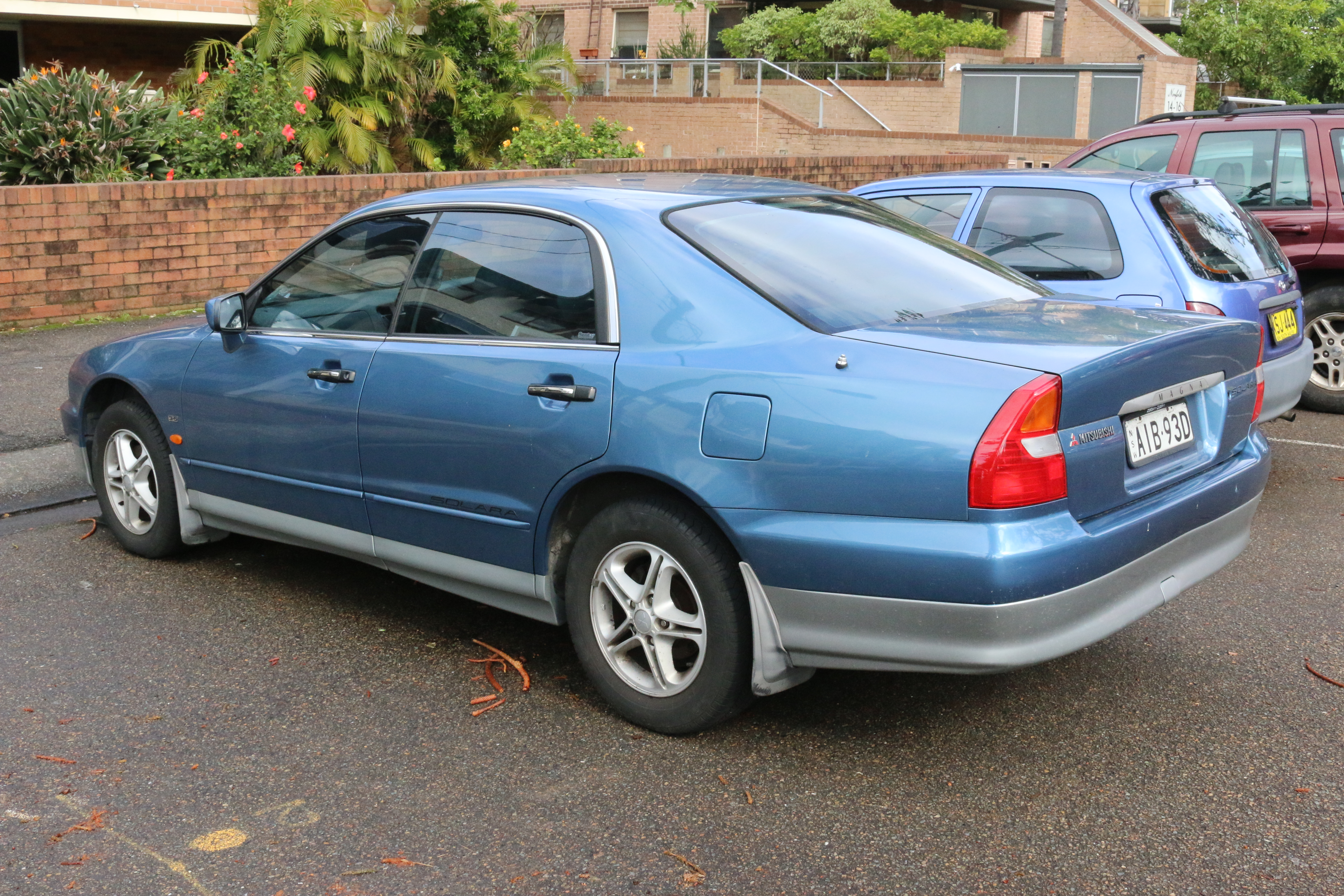 Mitsubishi Magna TH Solara